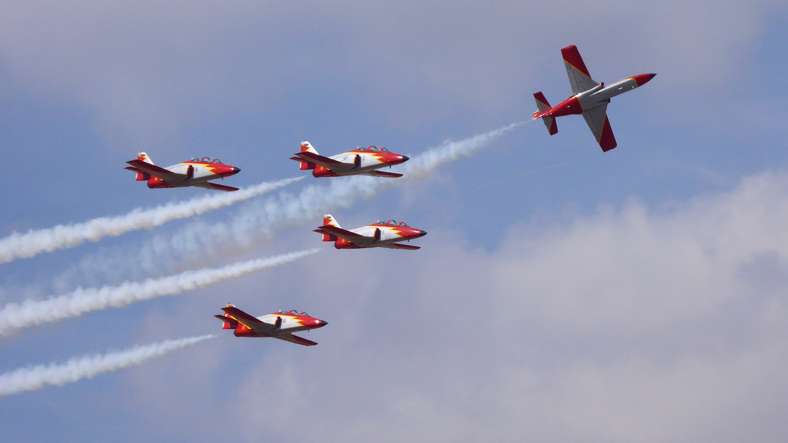 Patrulla Águila (gegründet im Jahr 1985) mit Aviojets vom Typ CASA C-101 der spanischen Militär-Kunstflugstaffel (eine komplette Staffel umfasst 7 Jets) am militärischen Airport San Javier am Mar Menor in der Regio Murcia Spanien Foto Wolfgang Pehlemann P1120863